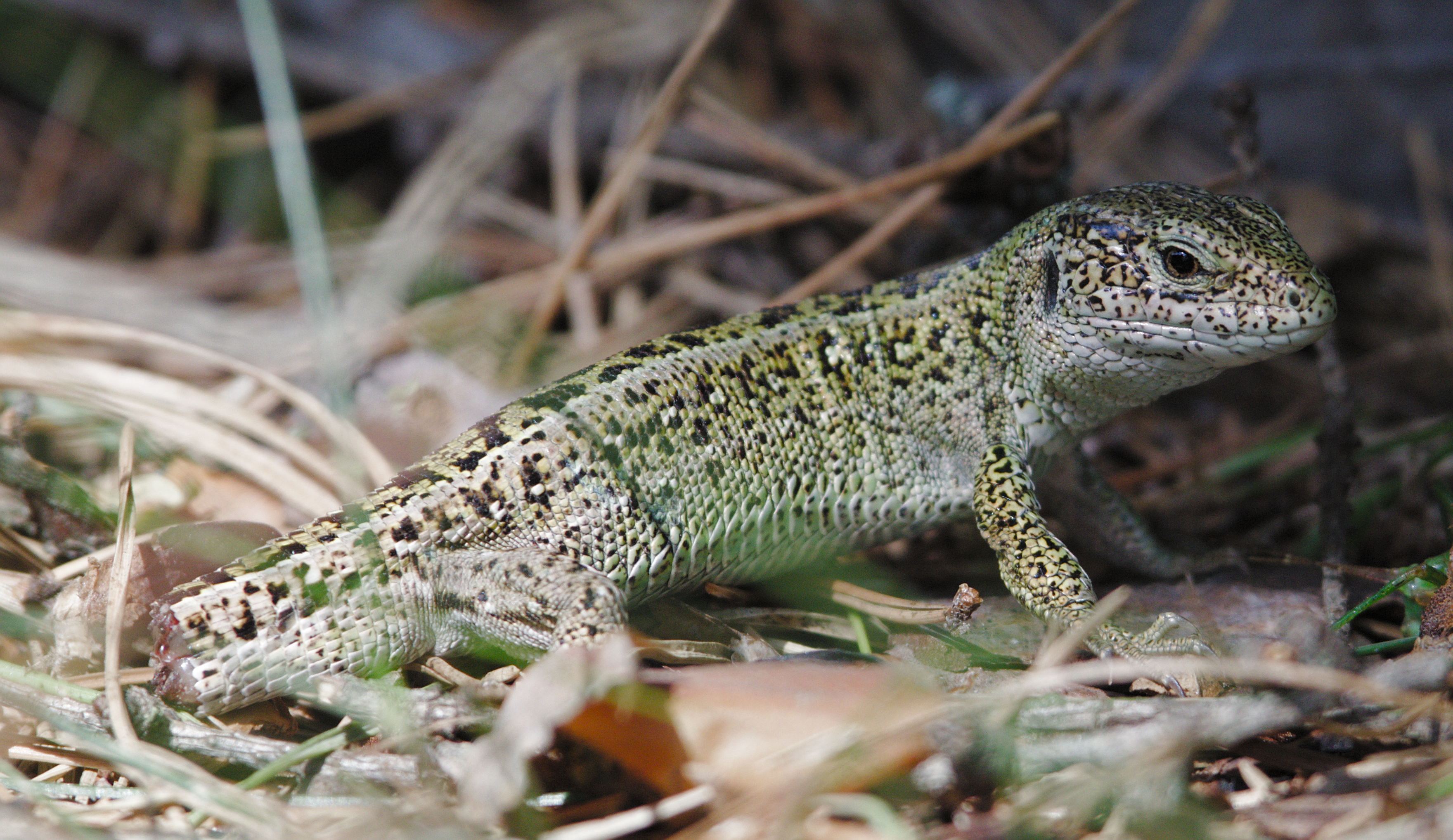 Jaszczurka zwinka z odrzuconym ogonem. Autor: Robert Moteka